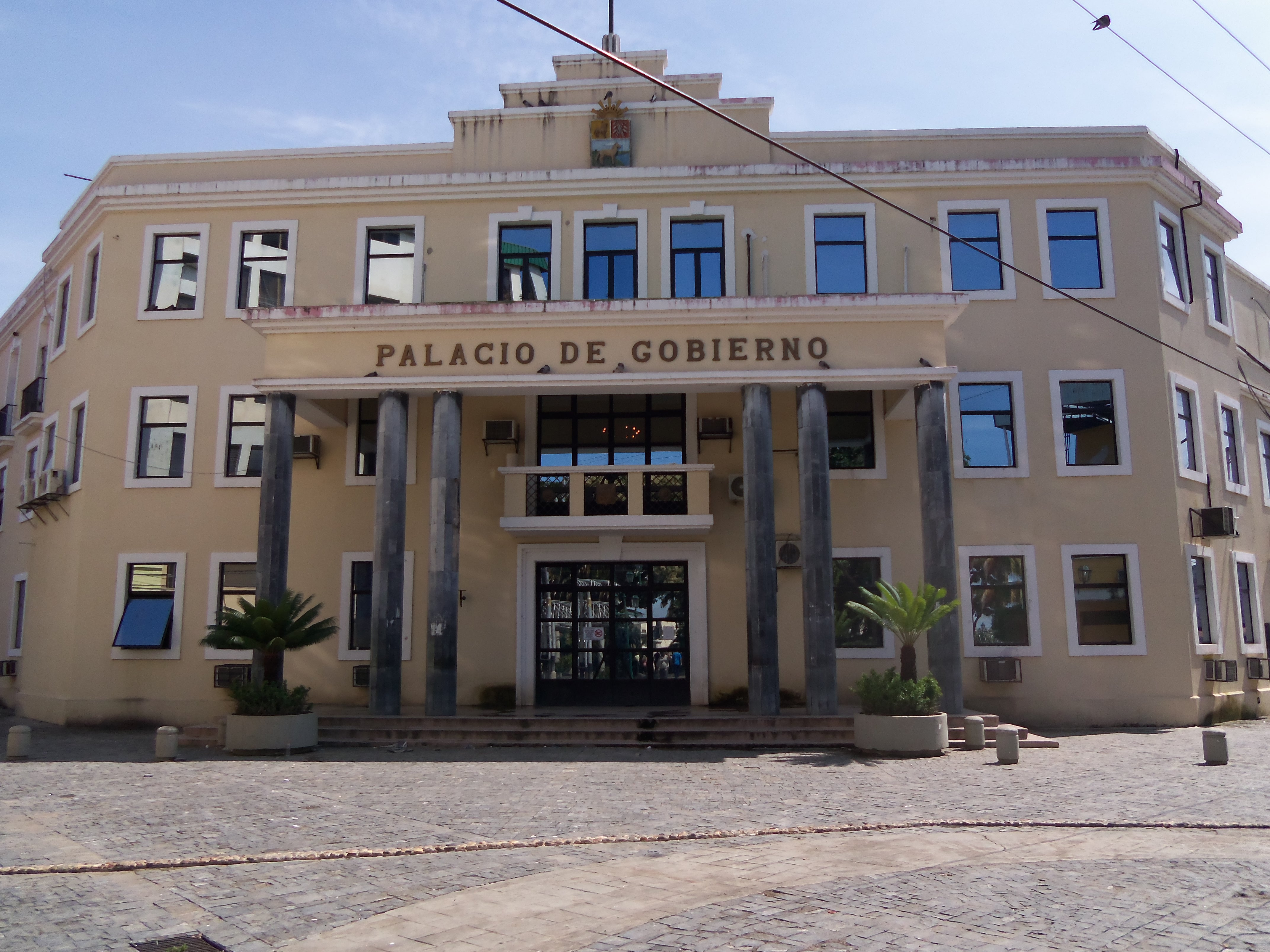 Palacio de Gobierno